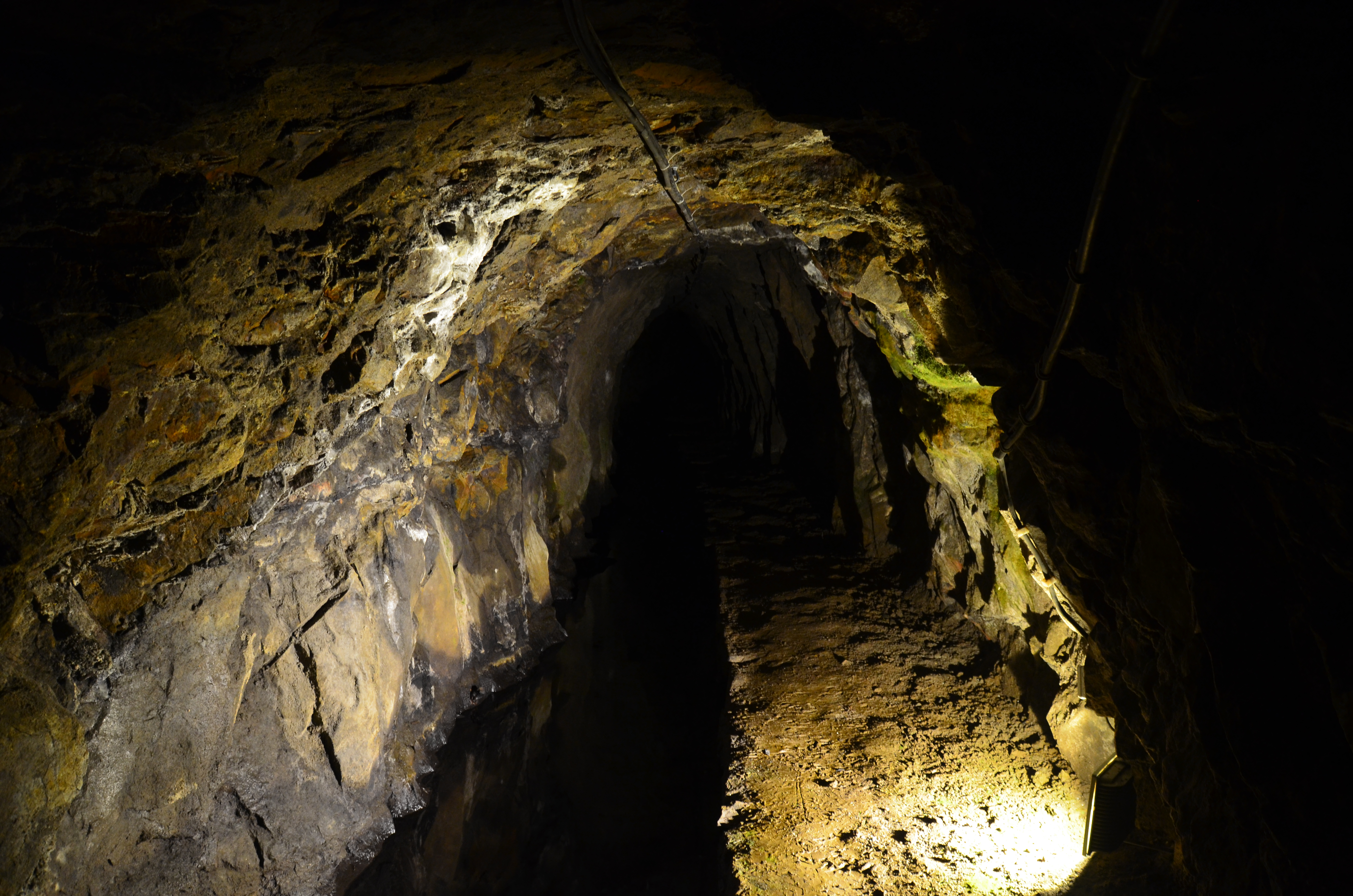 Der 19-Lachter-Stollen, ein Wasserlösungsstollen im Oberharz. Das Mundloch befindet sich in Wildemann; das Wasser fließt jedoch mittlerweile über den 13-Lachter-Stollen ab.